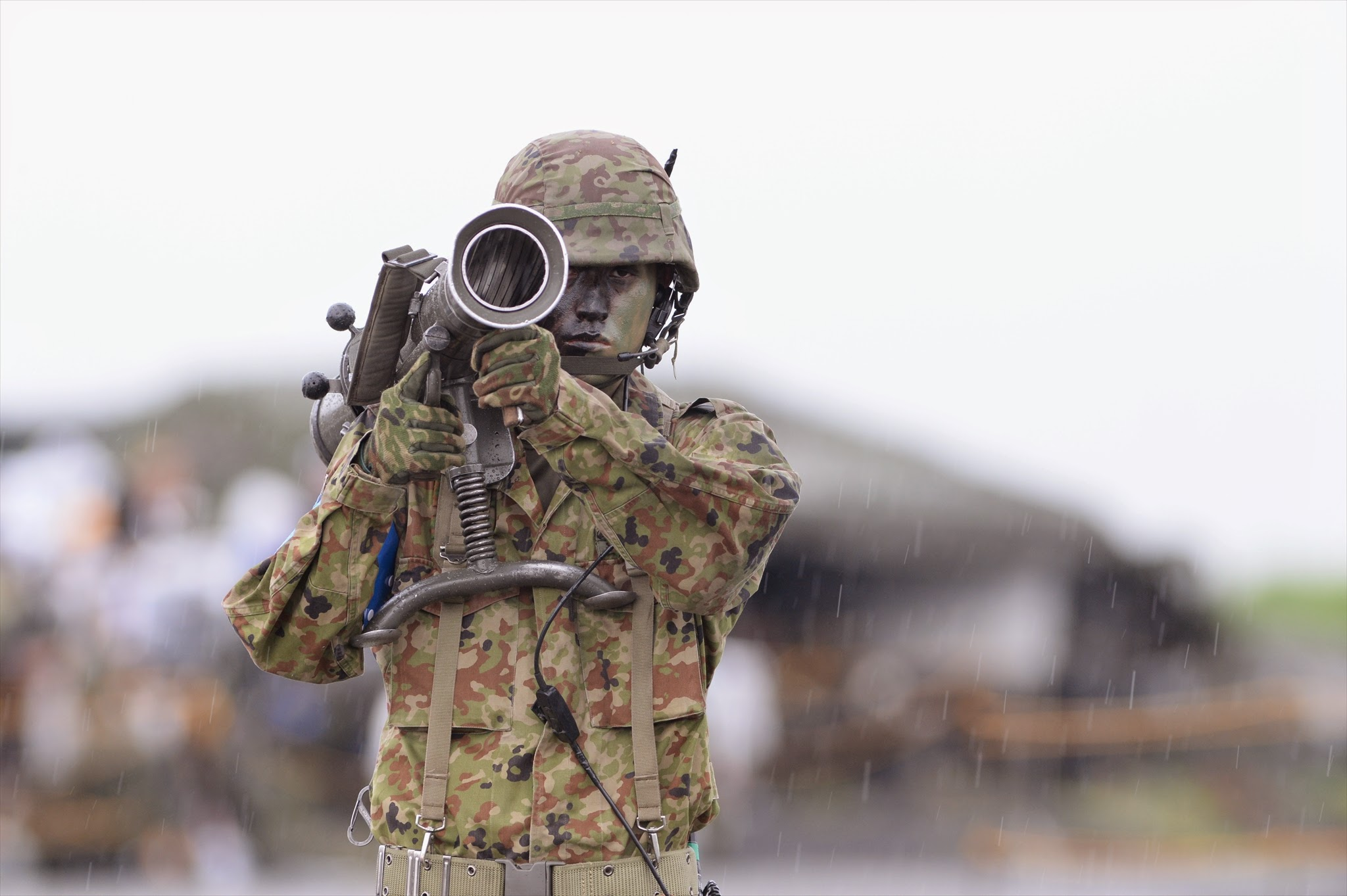 ８４ｍｍ無反動砲（富士総合火力演習）